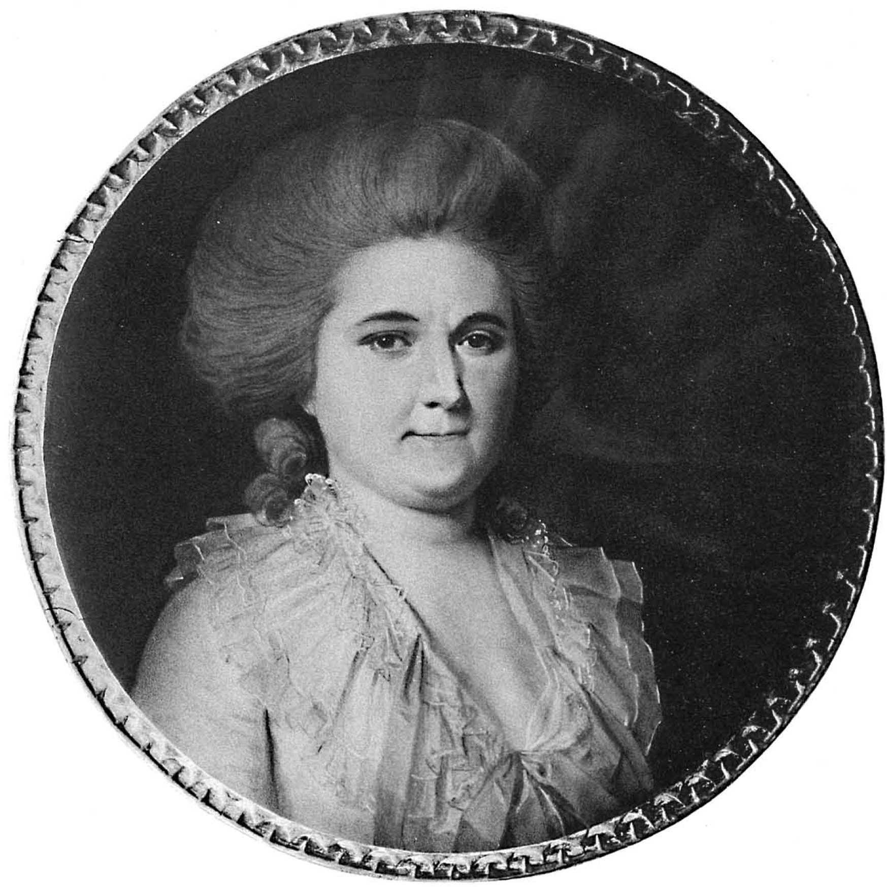 Графиня Софья Осиповна Апраксина (174?-18??)